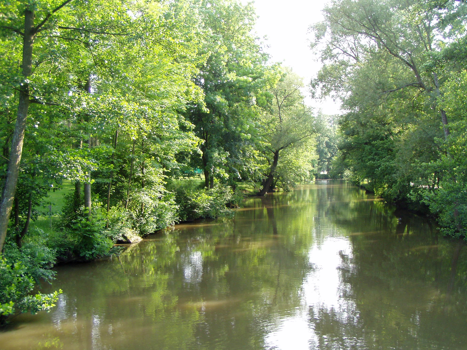 Franconian Saale (Fränkische Saale) in Bad Kissingen